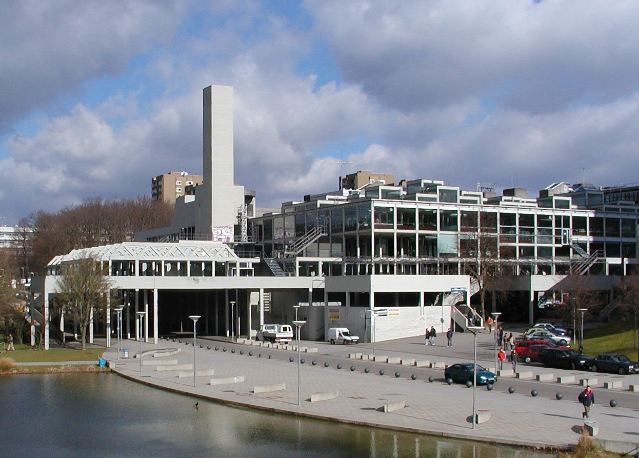 Die Mensa in Stuttgart Vaihingen